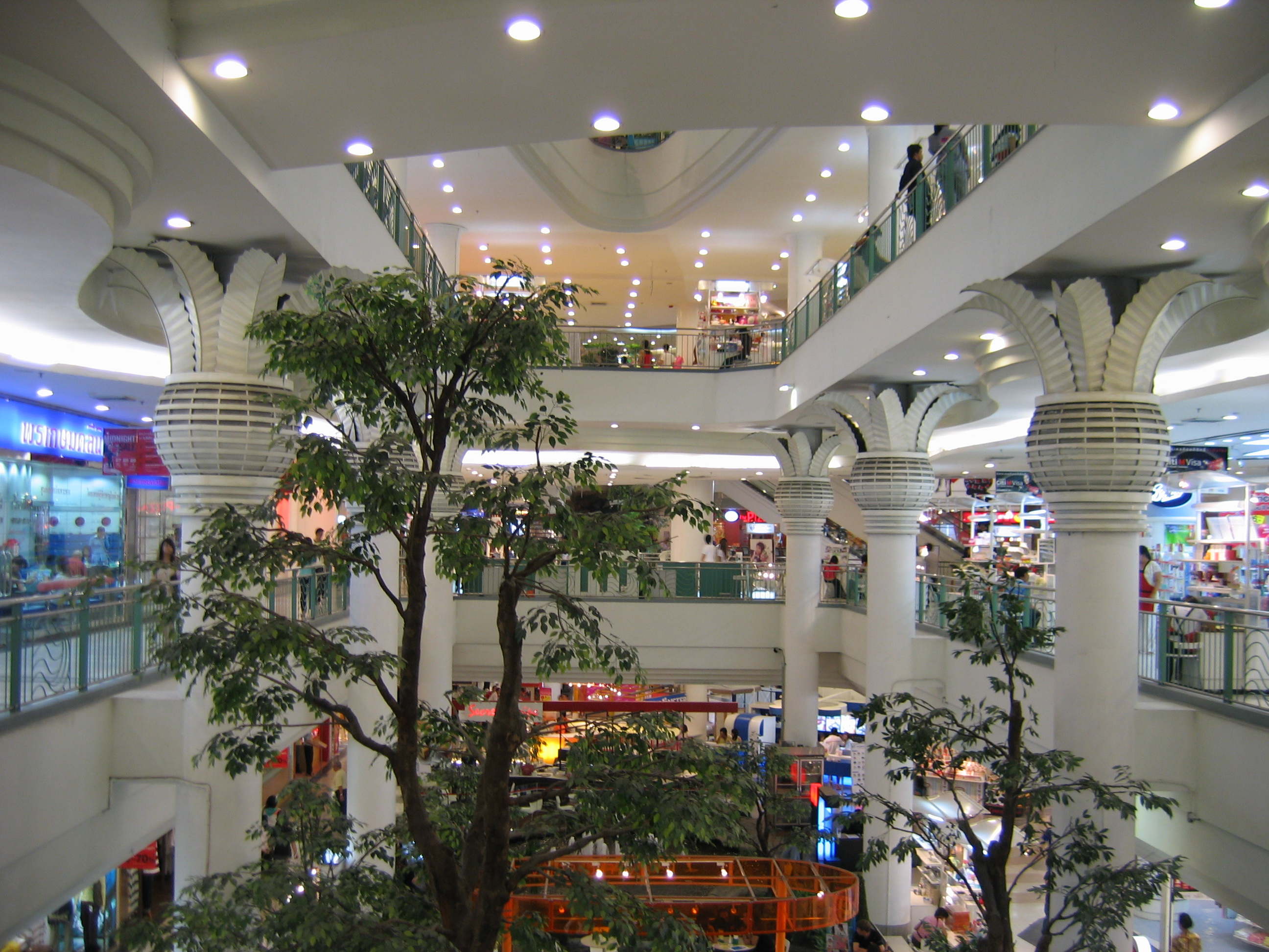 The Mall Bangkapi